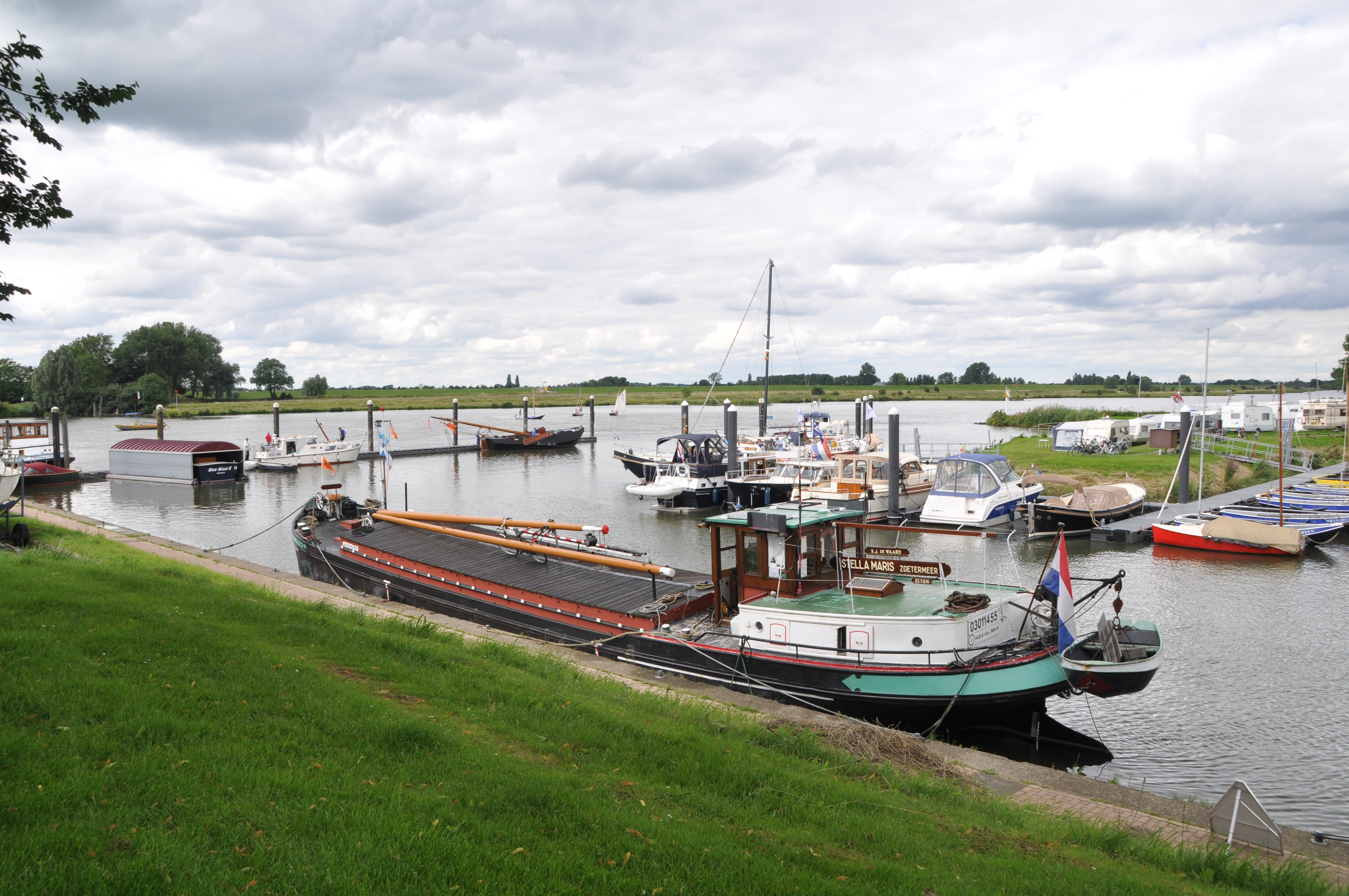 De STELLA MARIS voor de wal in de haven van Culemborg.